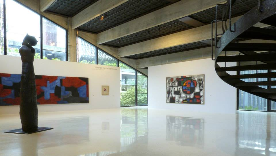 Plaza Contemporánea del Museo de arte contemporáneo de Caracas.